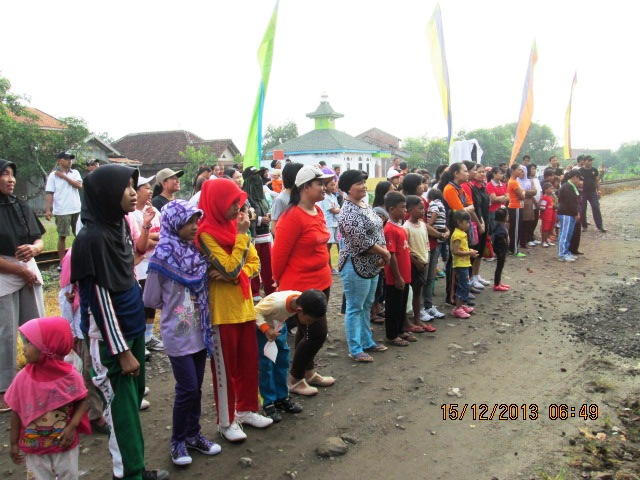 Peringatan Hari ibu di RW.06 Desa Kembangarum